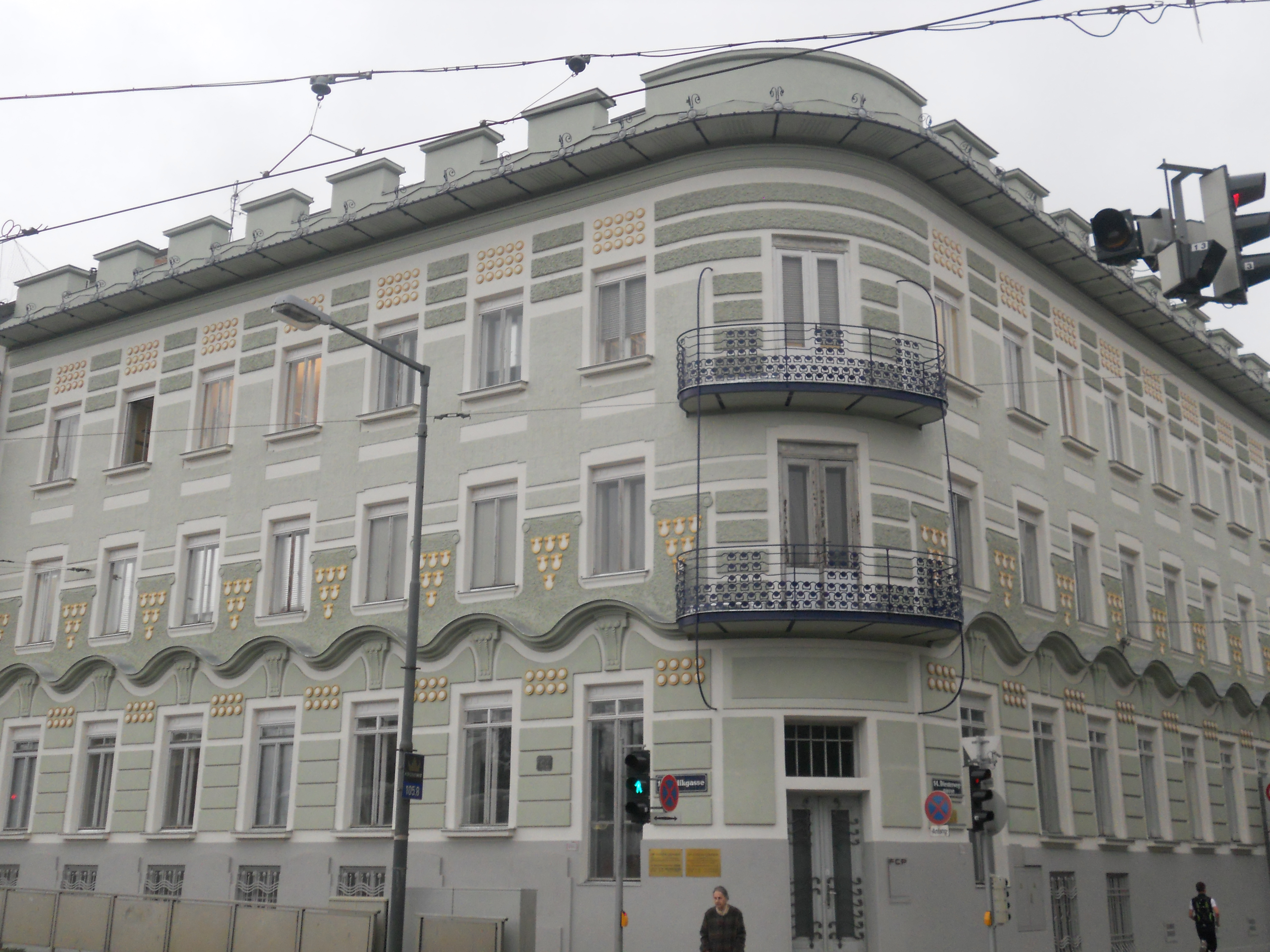 Haus Diesterweggasse 1 (= Hadikgasse 58a) in Wien